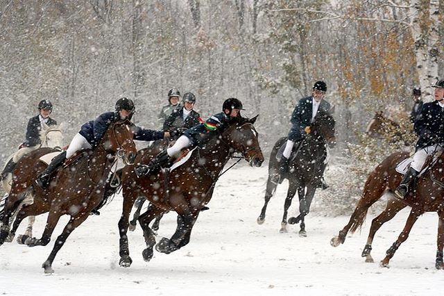 Tradycyjna pogoń za lisem w dniu św. Huberta. Łódzki Klub Jeździecki - gonitwa Św. Huberta.